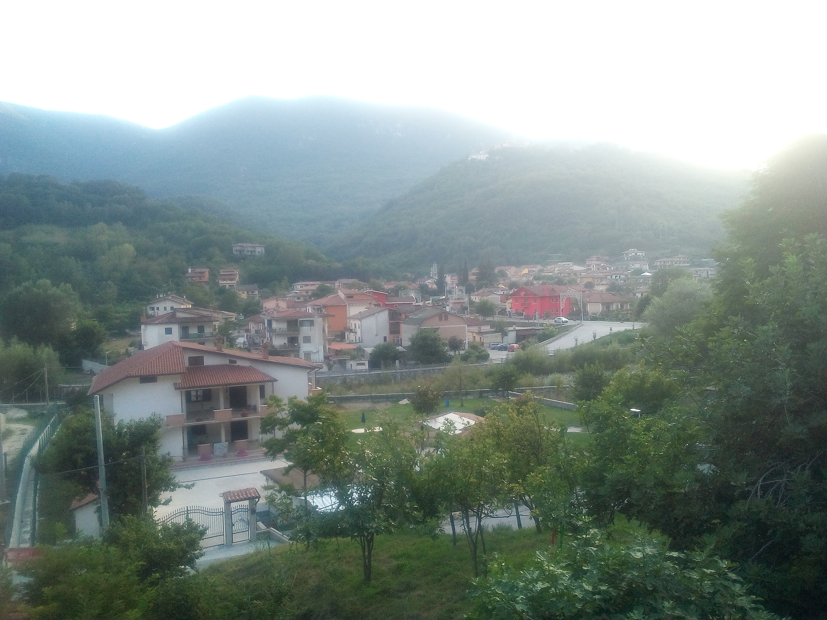 Veduta di Canistro Inferiore